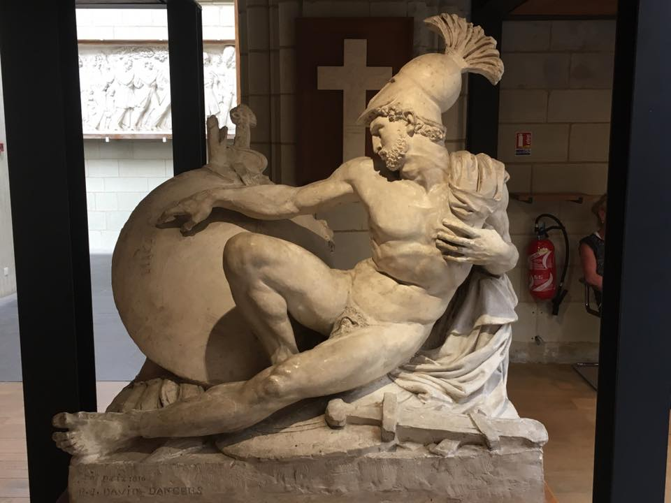 David d'Angers, Othryades, 1810, plâtre, Angers, galerie David d'Angers